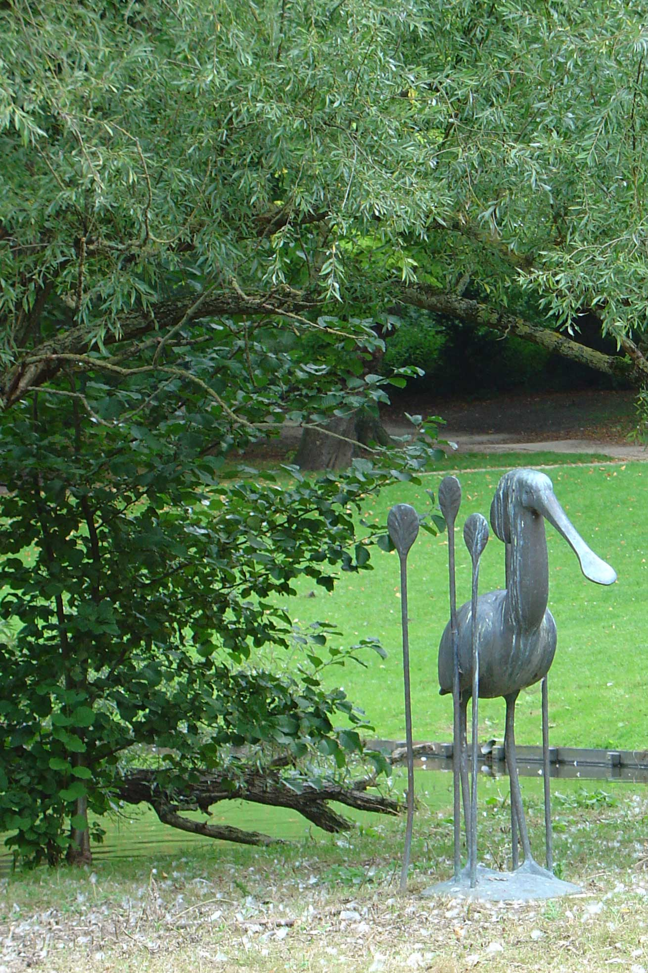 De lepelaar beeld van Jan van Baren in het Noorderplantsoen te Groningen